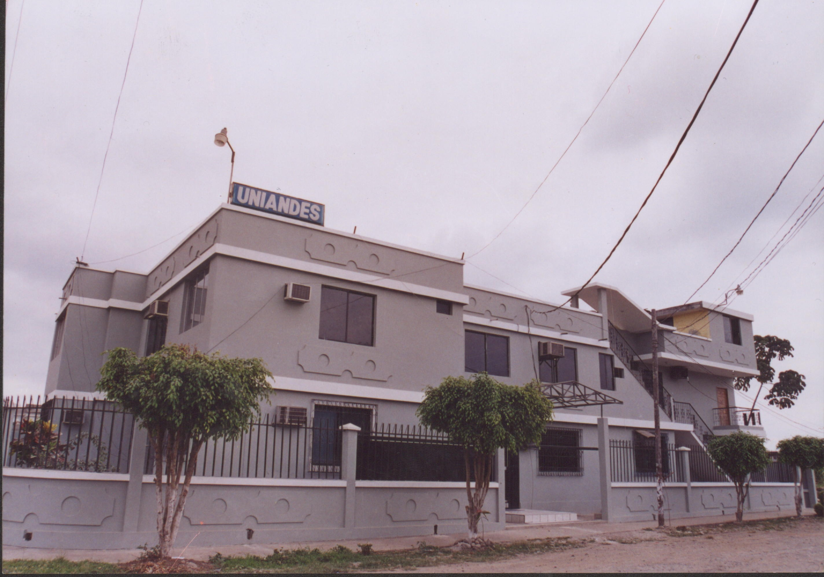 Uniandes Quevedo